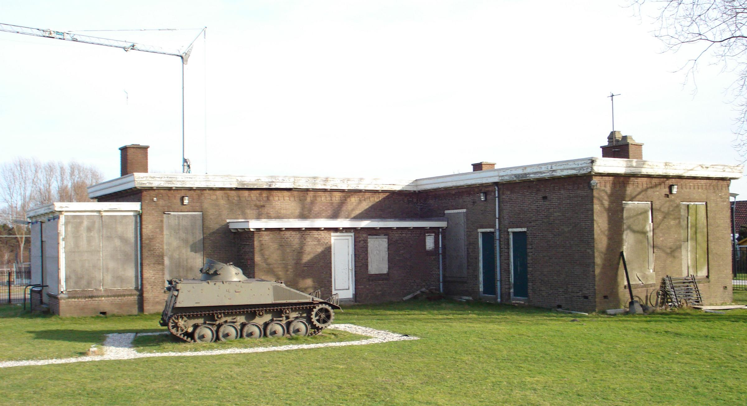 Hoek van Holland, militair verblijfsgebouw bij fort. Rijksmonument.